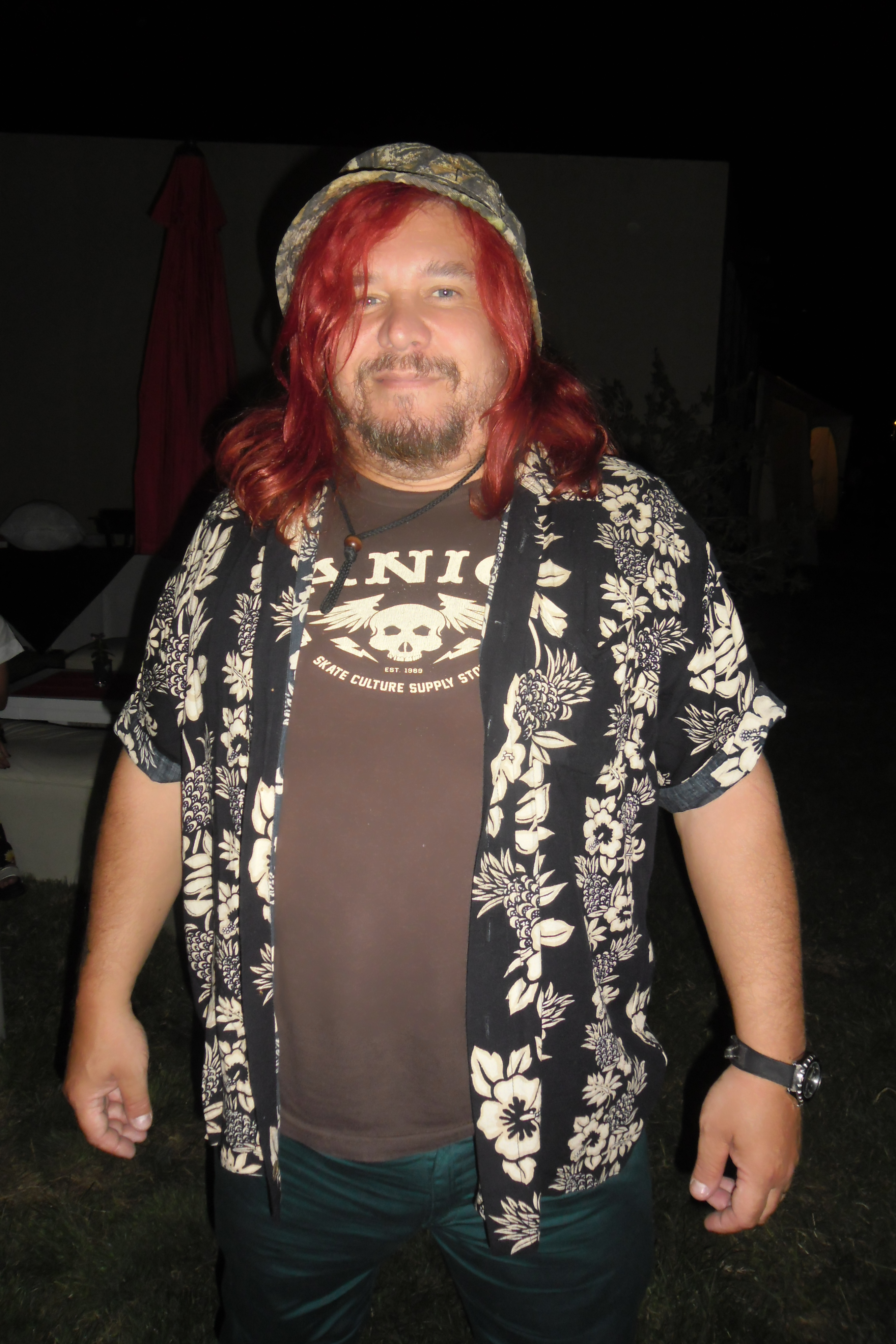 Guillermo Wallas Cidade en 2015.